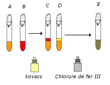 CREE LE 12/07/2006